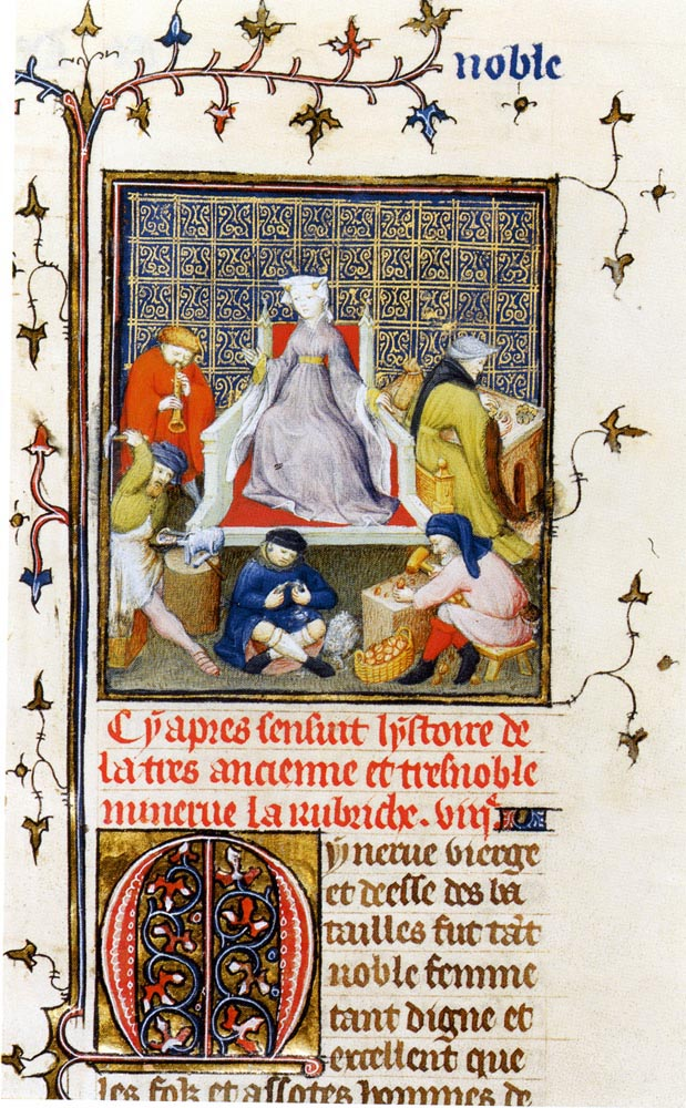 De mulieribus claris/ Minerva